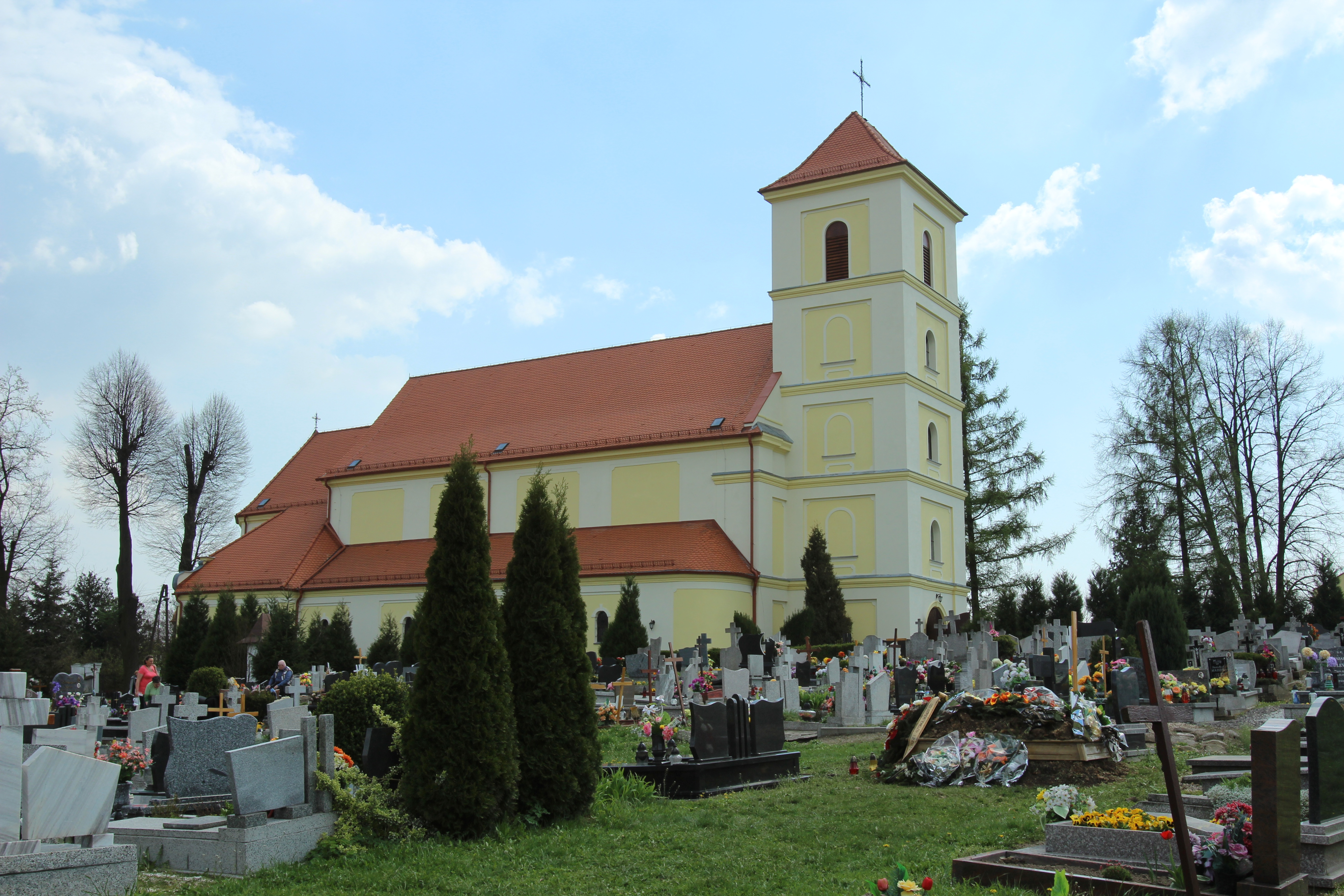 Jasienica Dolna – rzymskokatolicki kościół parafialny p.w. św. Marcina, XV, XVIII, XX.